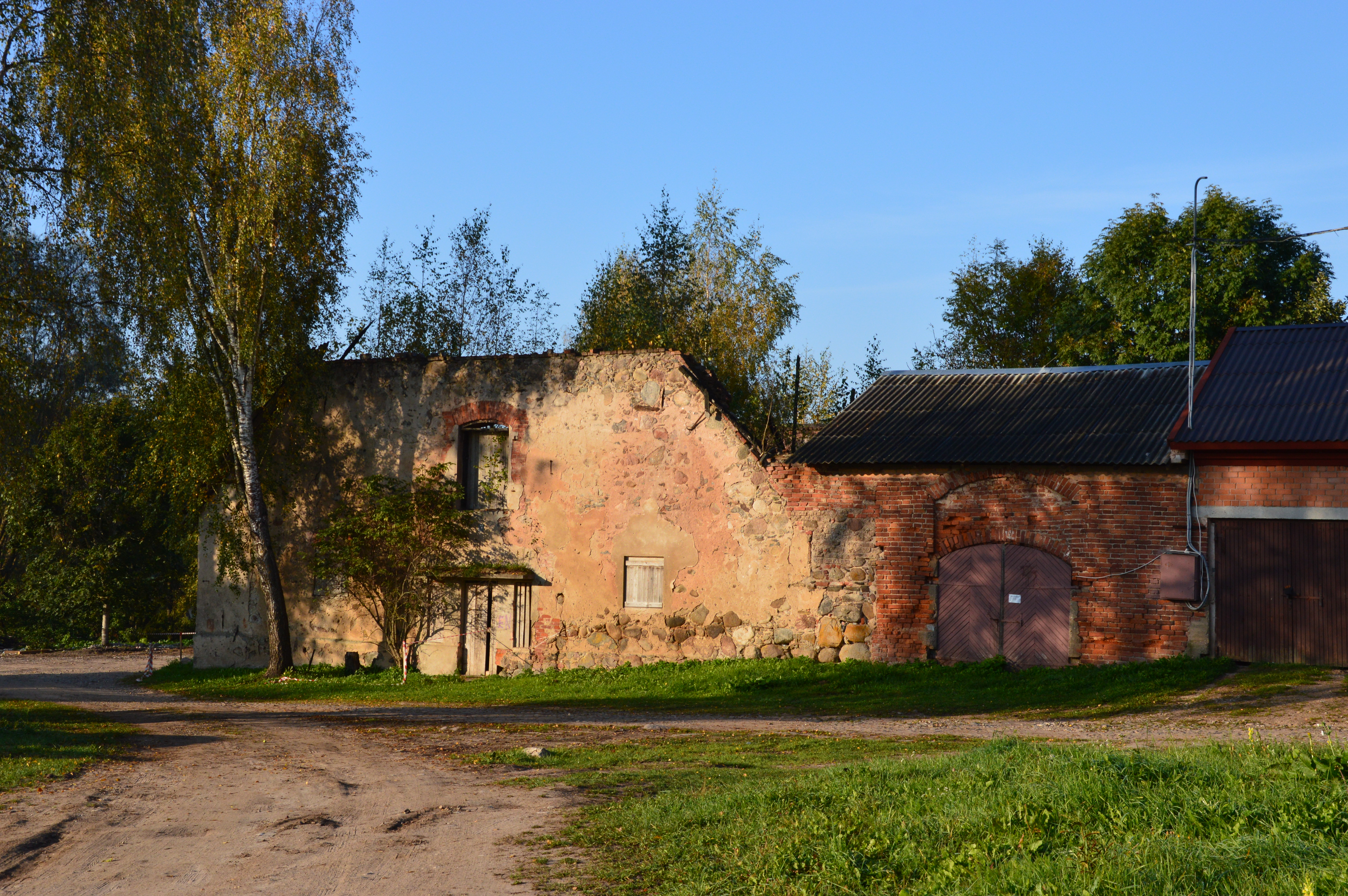 Luunja mõisa viinaköök